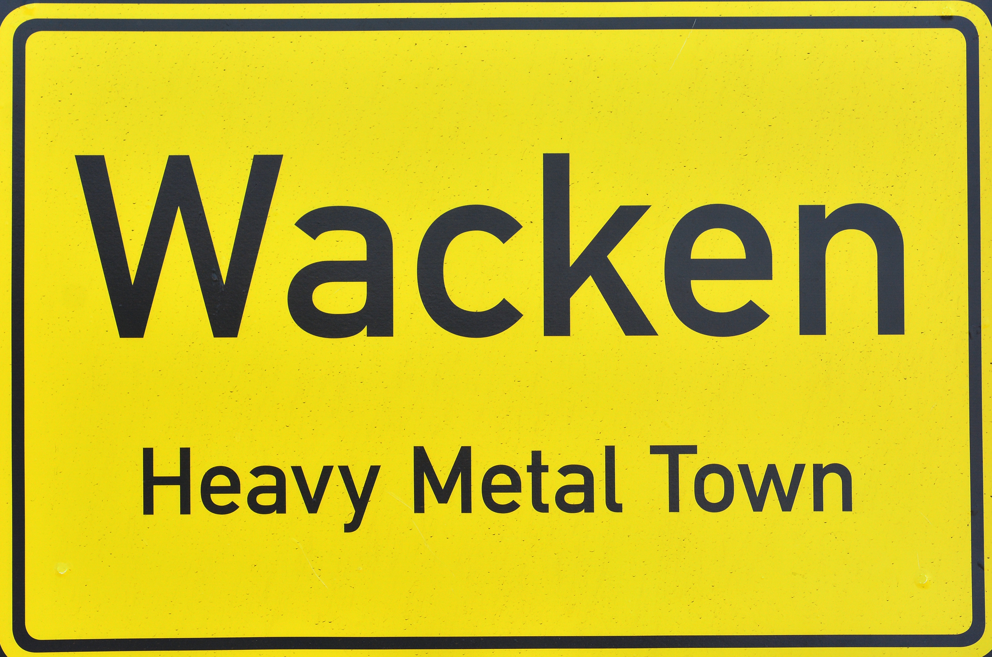 Fiktives Ortsschild Wacken Heavy Metal Town beim Wacken Open Air 2014